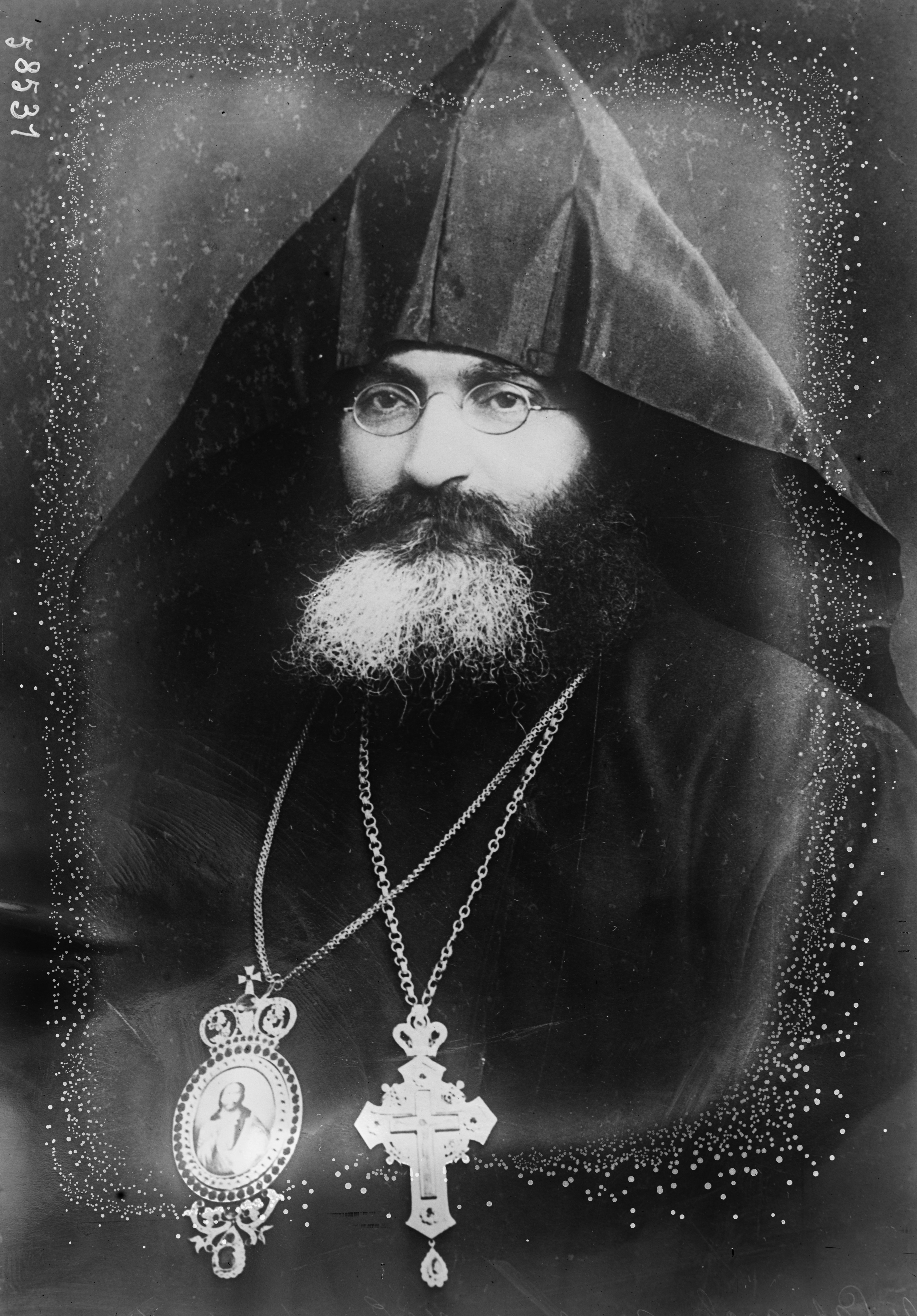 Le patriarche arménien de Constantinople Zaven qui a été reçu par le roi d'Angleterre.